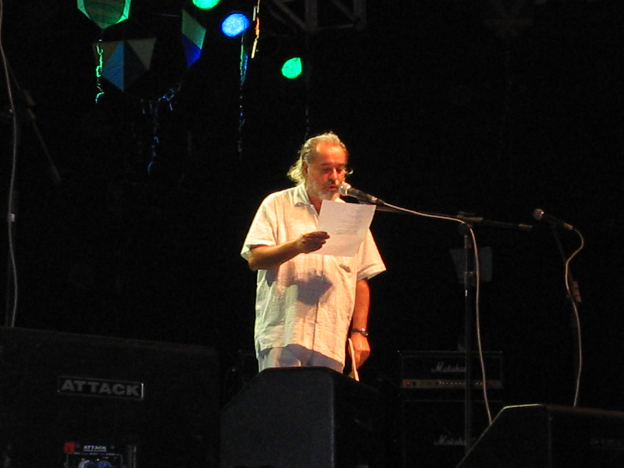 O poeta brasileiro Carlos Lima é autor de vários livros e também é professor da UERJ. Está nesta foto num evento no Circo Voador, Rio de Janeiro, lendo um de seus poemas.